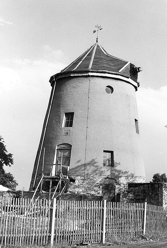 Original image description from the Deutsche Fotothek Dresden-Leutewitz. Leutewitzer Windmühle, Turmholländer, Baujahr 1839, Steinbacher Straße 56